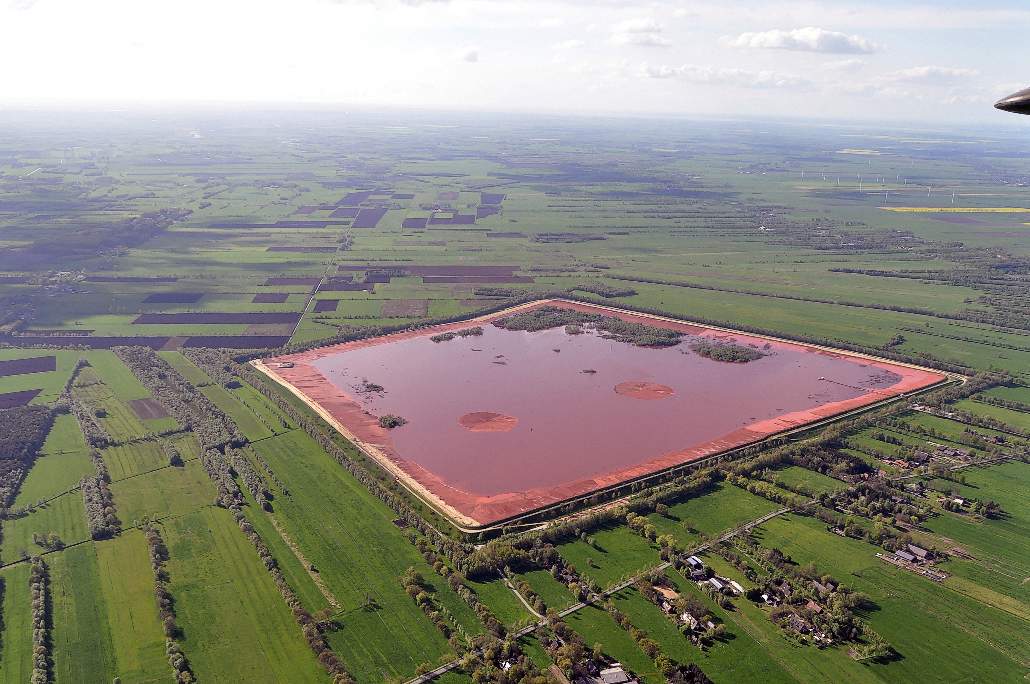 Luftbilder von der Nordseeküste 2012-05. - Rotschlamm-Becken der ehem. VAW Stade, Lage 10 km NW Stade